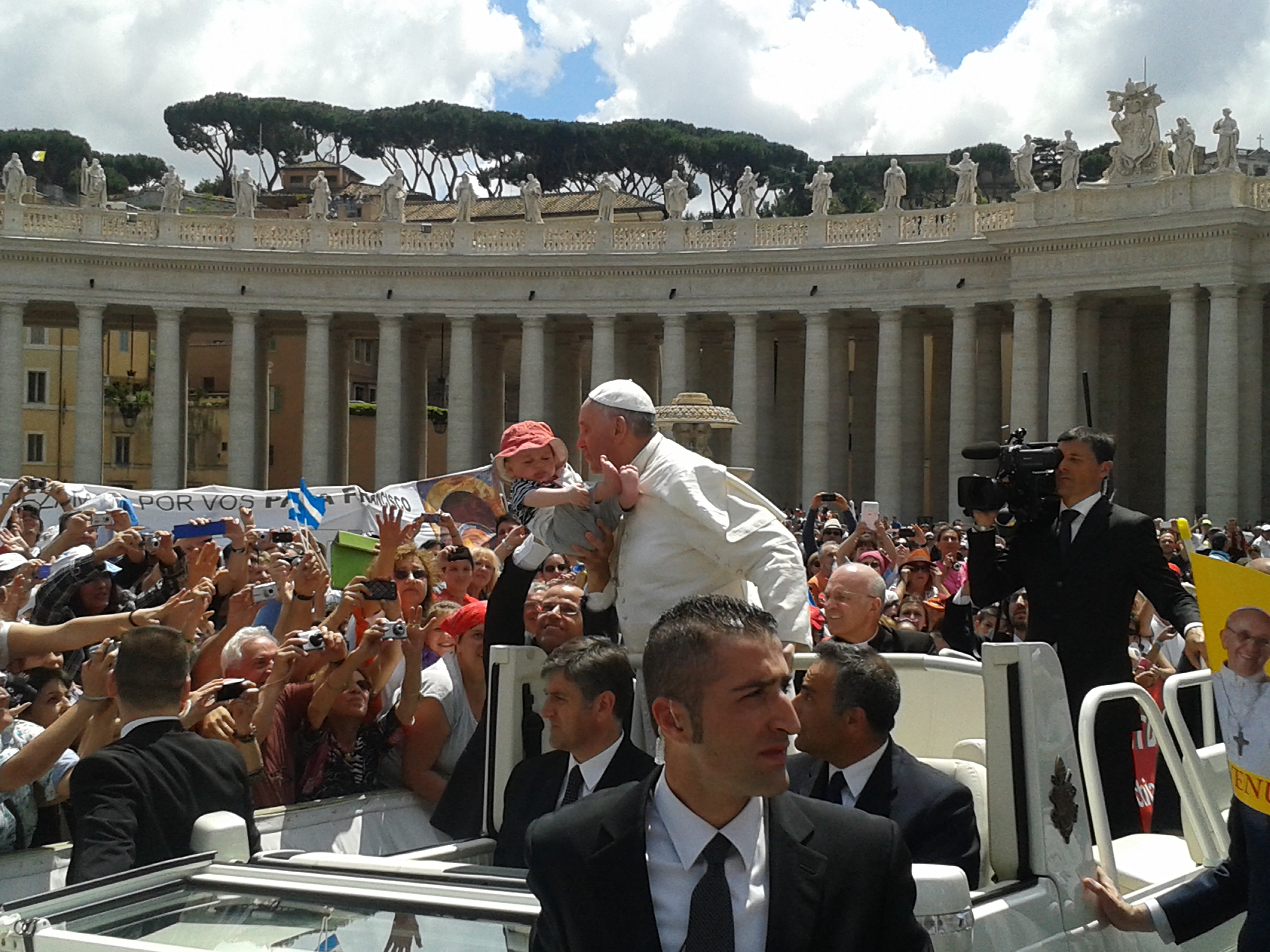 Il Papa